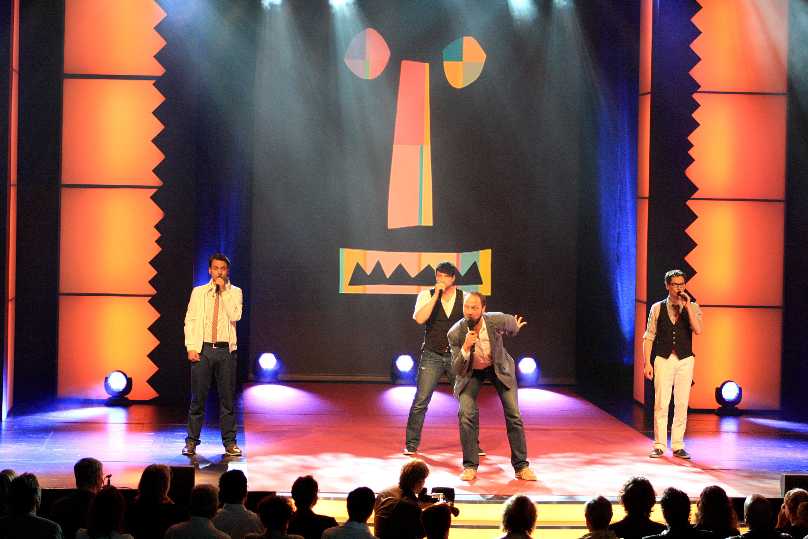 Auftritt bei der Prix Pantheon Gala 2012, Oper, Bonn.